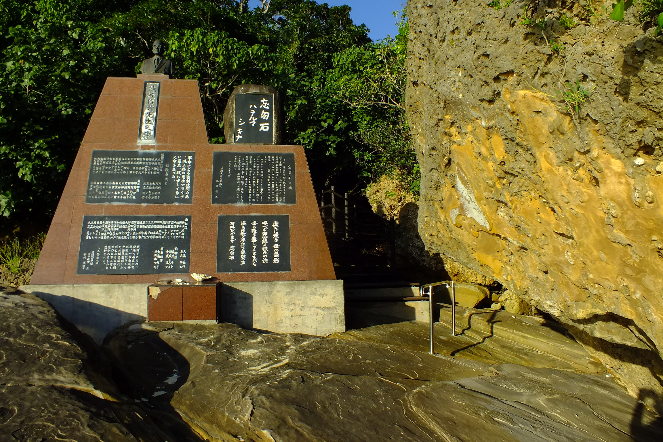 忘勿石「忘勿石 ハテルマ シキナ」。波照間国民学校の校長であった識名信升によって国民学校の青空教室として入学式と授業が行われた場所。疎開地でも教育を続けようとした試みに対し、強制疎開の命令者山下軍曹はそれを中止させた。間もなくマラリアの伝染が始まり、子供達も多くがその命を落とした。わすれな石の碑この10文字は、識名校長が、自らの直訴により疎開を解除し、島に帰る際にひっそりと刻んだもので、ほとんどの者はその存在すら知らなかった。